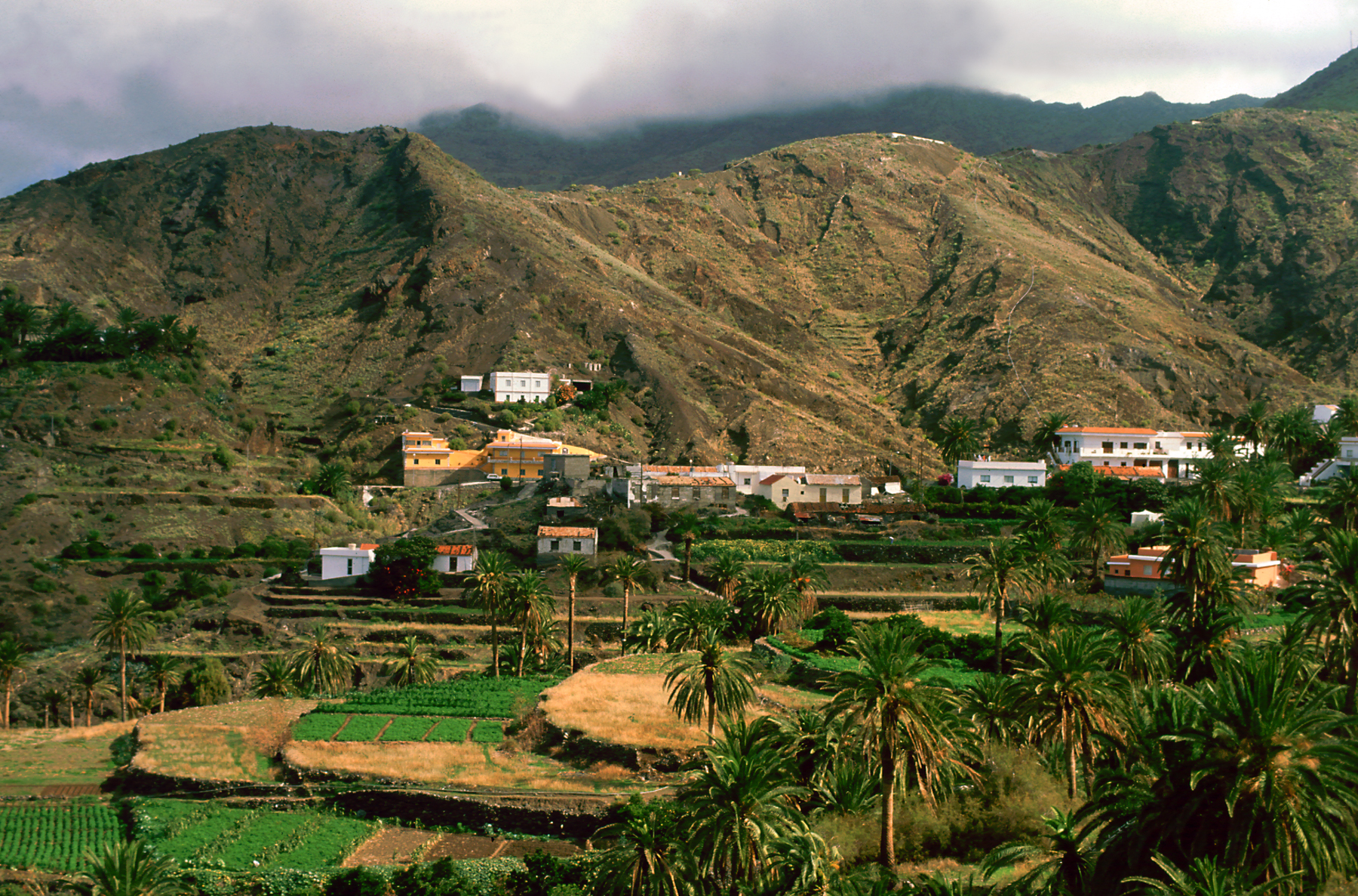 Alojera, La Gomera, Spanien